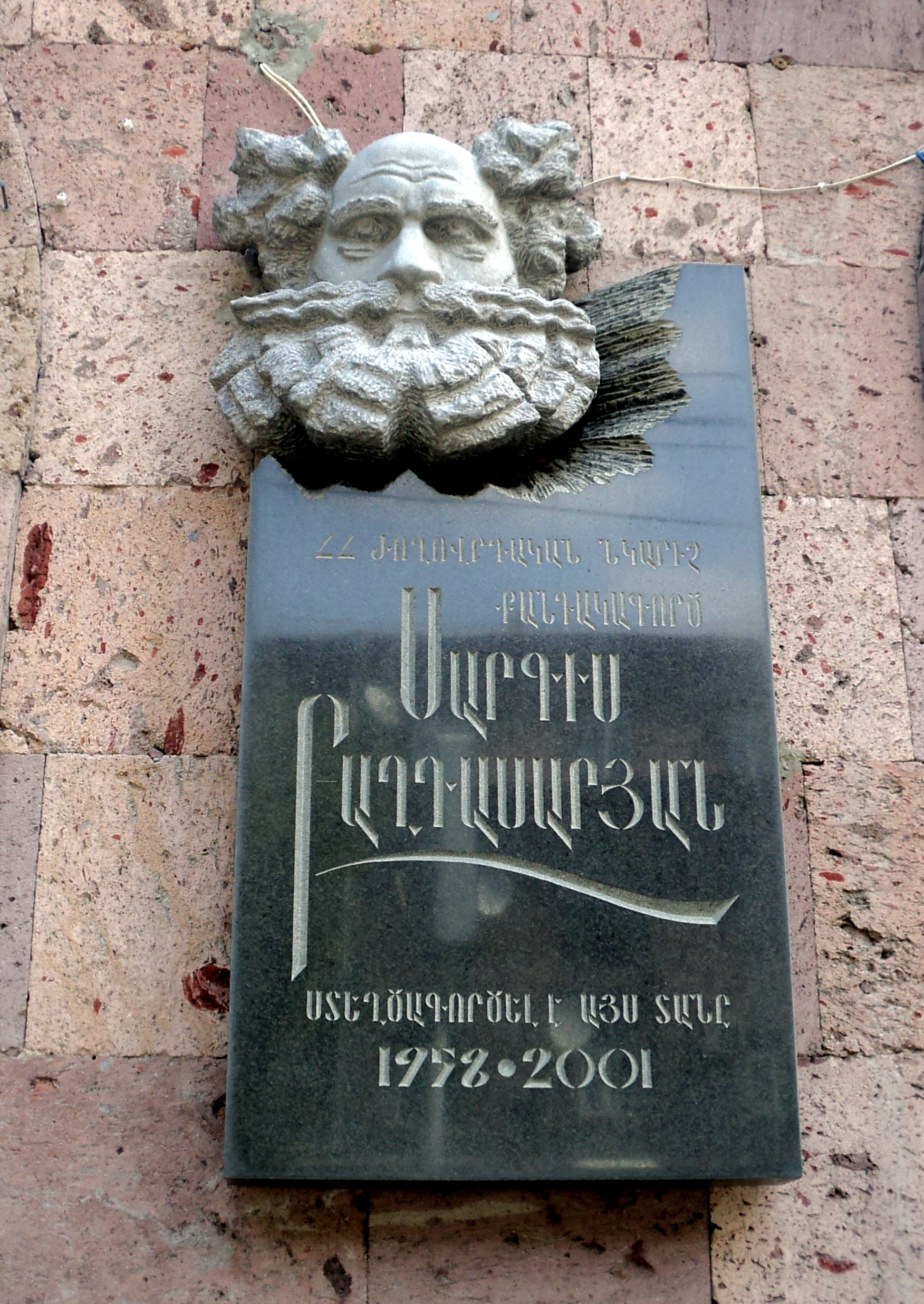 Սարգիս Բաղդասարյանի հուշատախտակը Կիևյան փողոցում